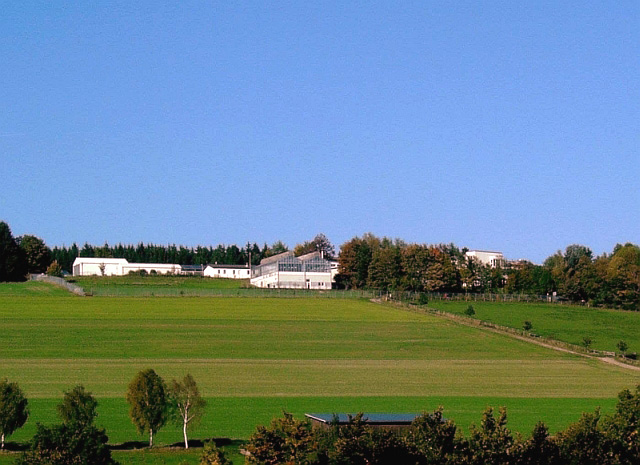 Fraunhofer Institut in Schmallenberg, Germany.